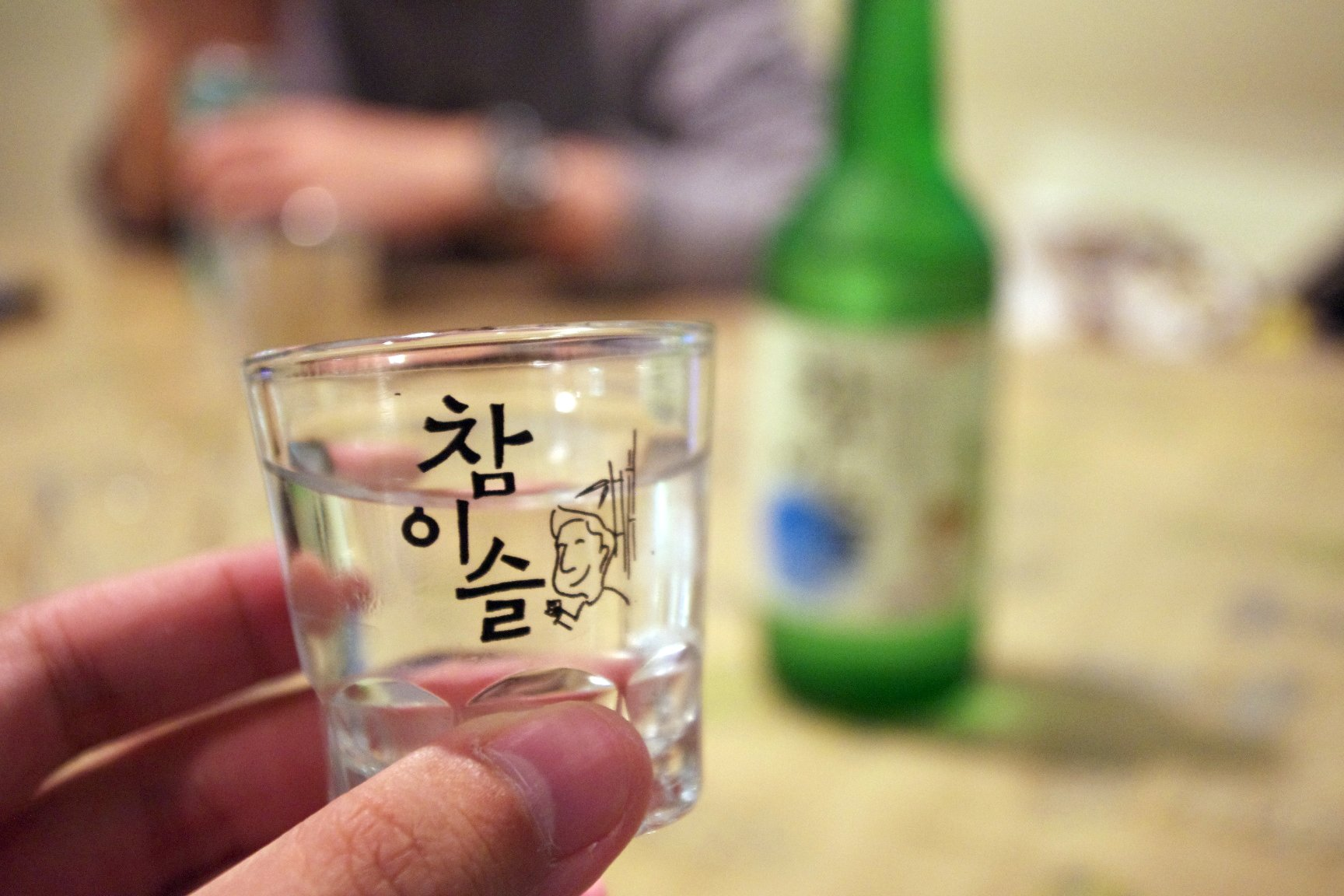 Cheers!